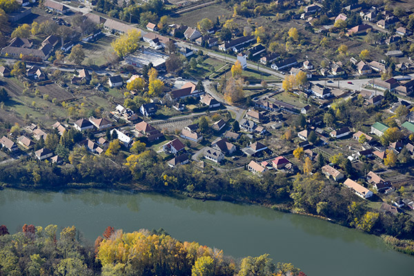 Folyóparti látkép légi fotón (Tiszadob)